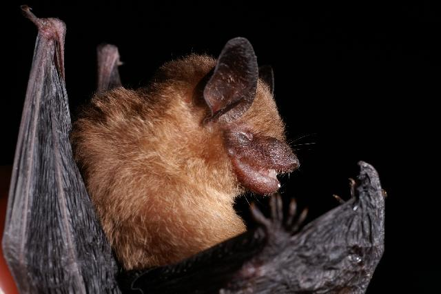 Rhogeessa aeneus